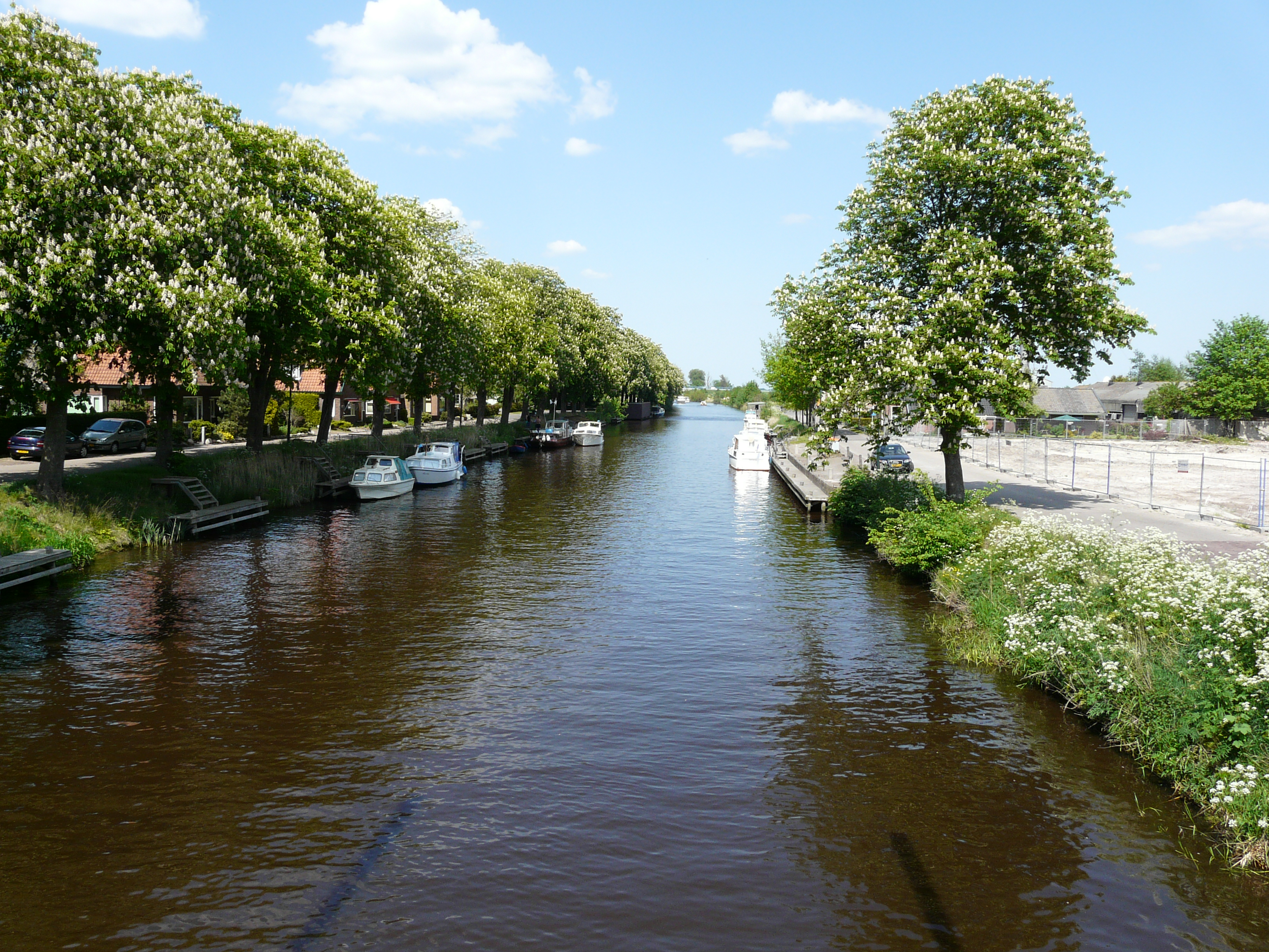 Peinderkanaal yn De Pein